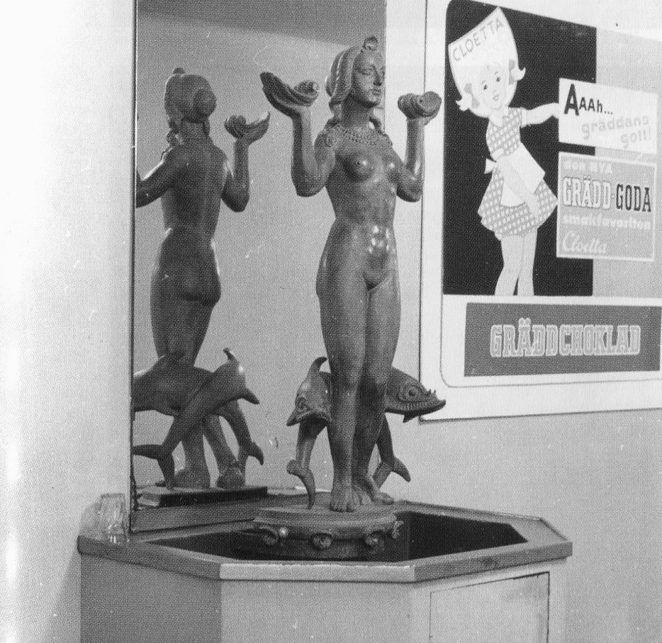 Biograf Göta skulptur i foajén